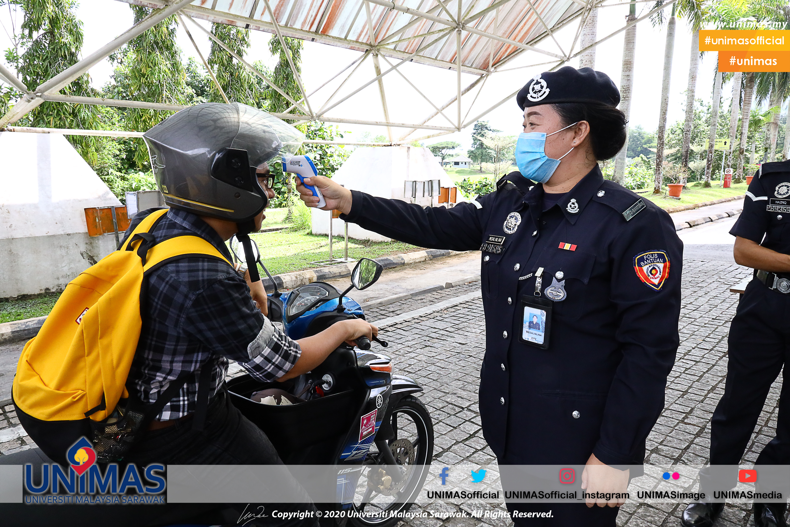 Keadaan semasa Penutupan Sementara Kampus UNIMAS Serta Perintah Kawalan Pergerakan bagi Menghadapi Penularan Wabak Coronavirus 2019 (COVID-19) UNIMASofficial UNIMAS Teguh Bersama Impacting Community Integrity • Innovative • Sincerity • Perseverance • Collegiality FB // Twitter // UNIMASofficial IG // UNIMASofficial_instagram Youtube // UNIMASmedia Flickr // UNIMASimage Flickr // UNIMASimage